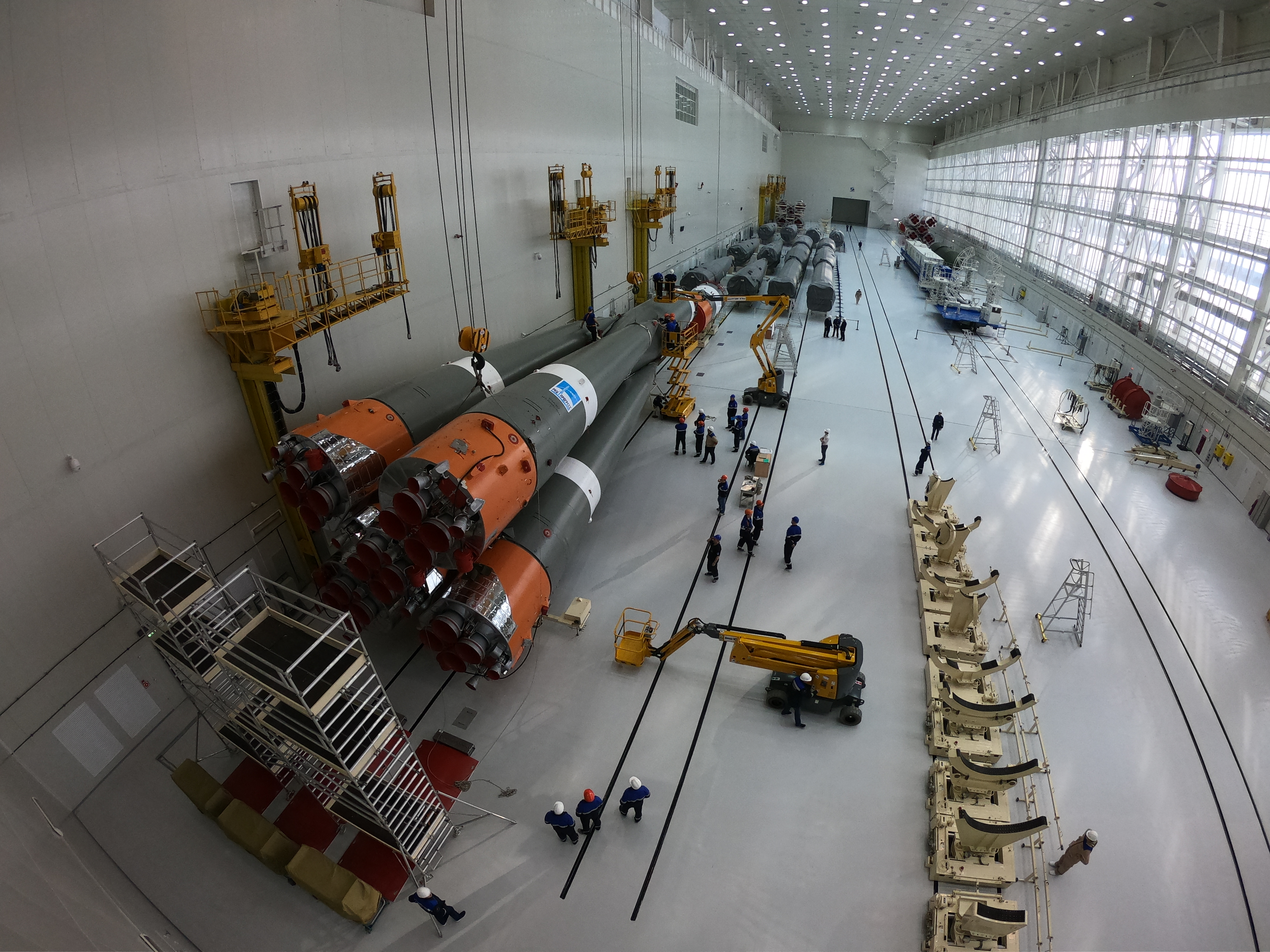 Сборка ракетоносителя